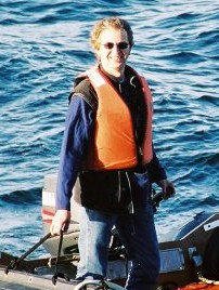 Jim Payne, Newfoundland folk singer